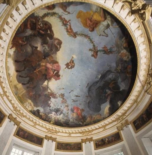 Charles Le Brun, L'Aurore, voûte du pavillon de l'Aurore, Sceaux, musée de l'Ile de France